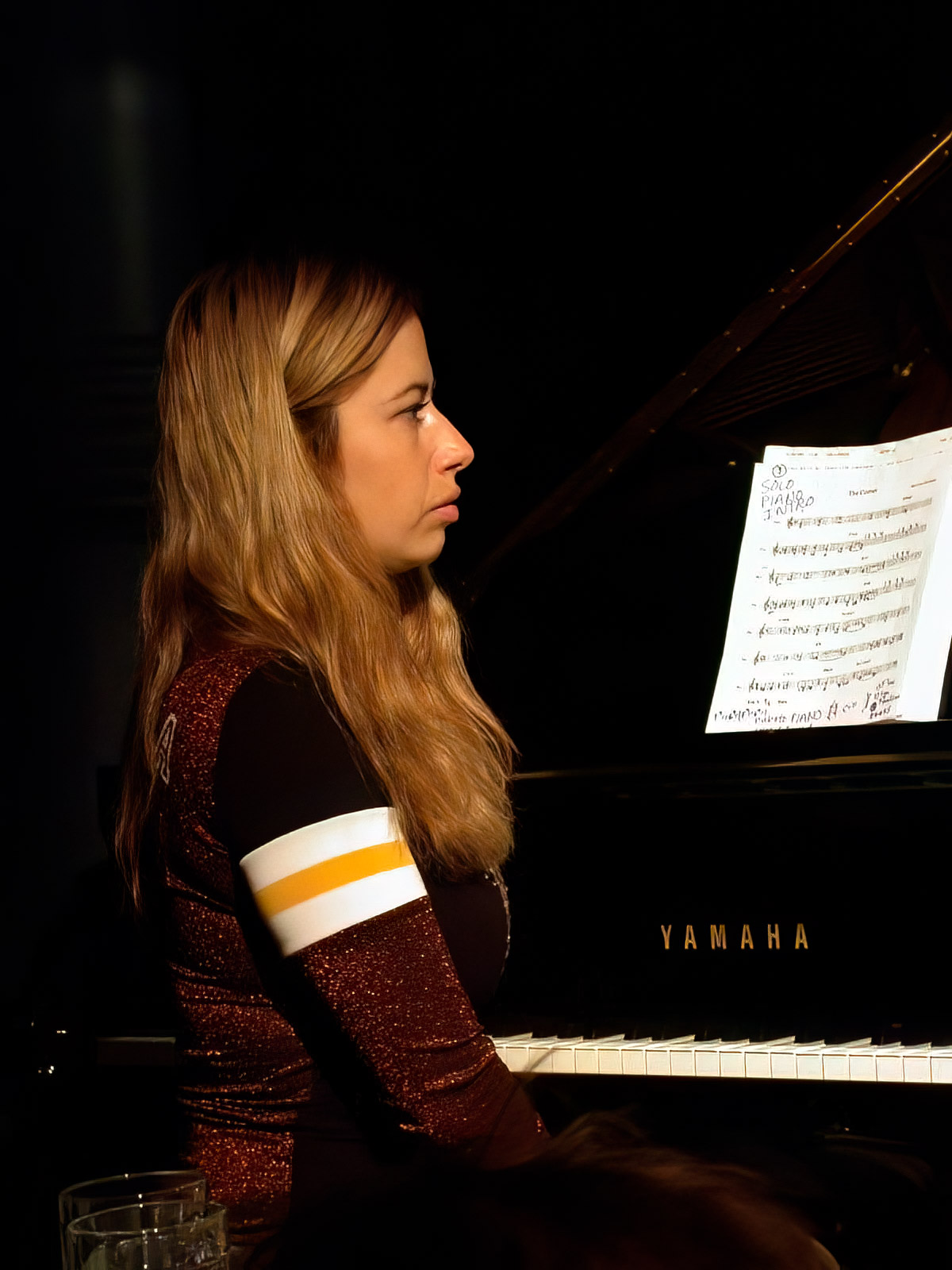 Rachel Z. in Munich, 2002